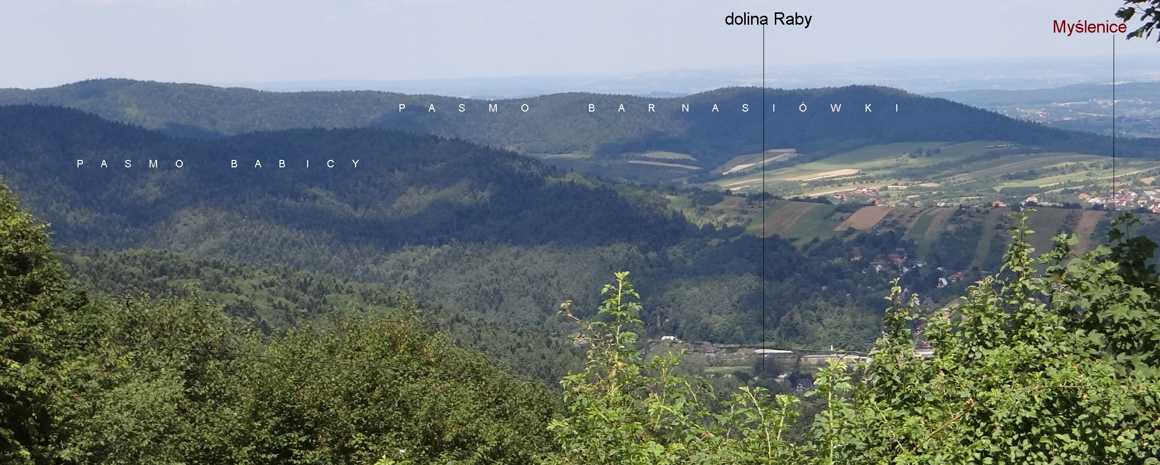 Widok z Chełmu na Pasmo Babicy i Barnasiówki